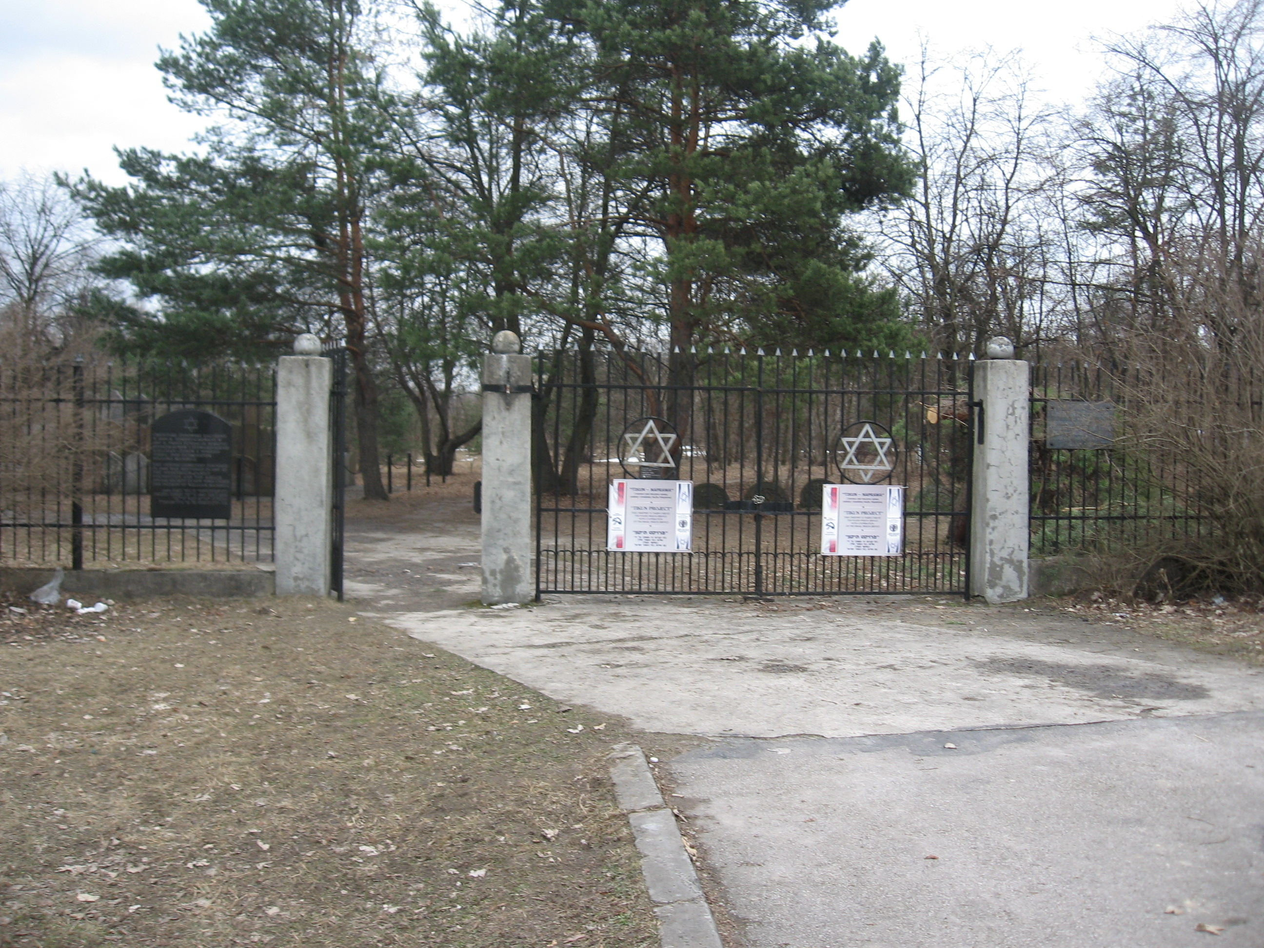 שער בית הקברות היהודי בקילצה